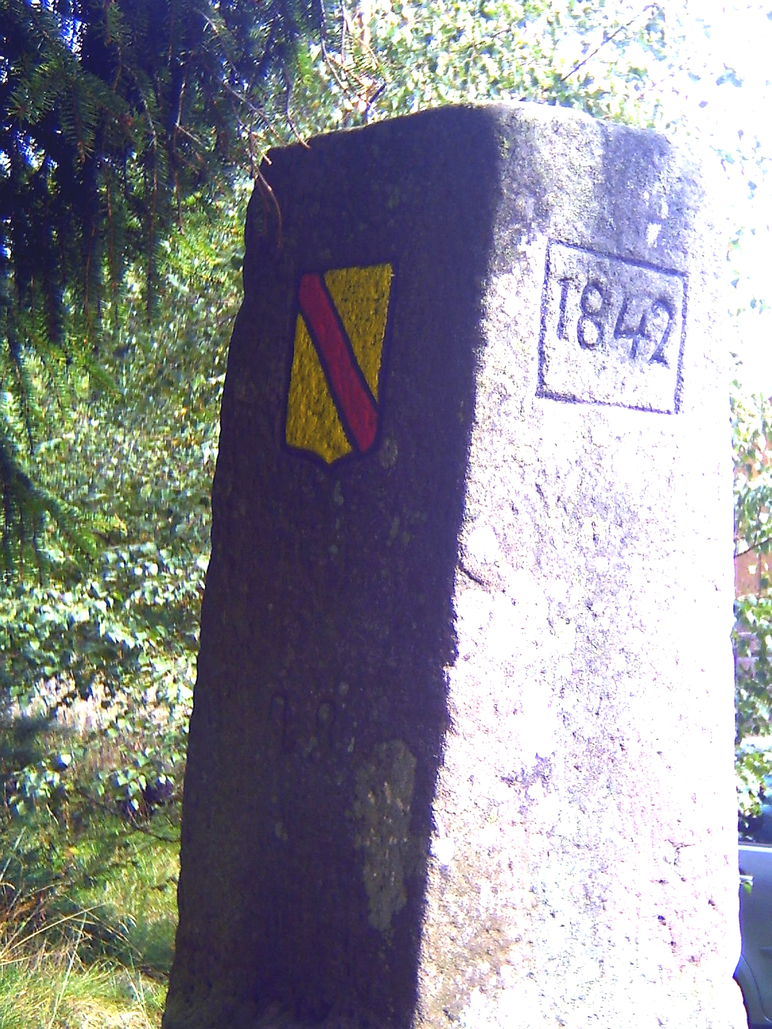 Boundary Stone between Baden and Württemberg on the Mooswaldkopf/Fohrenbuehl